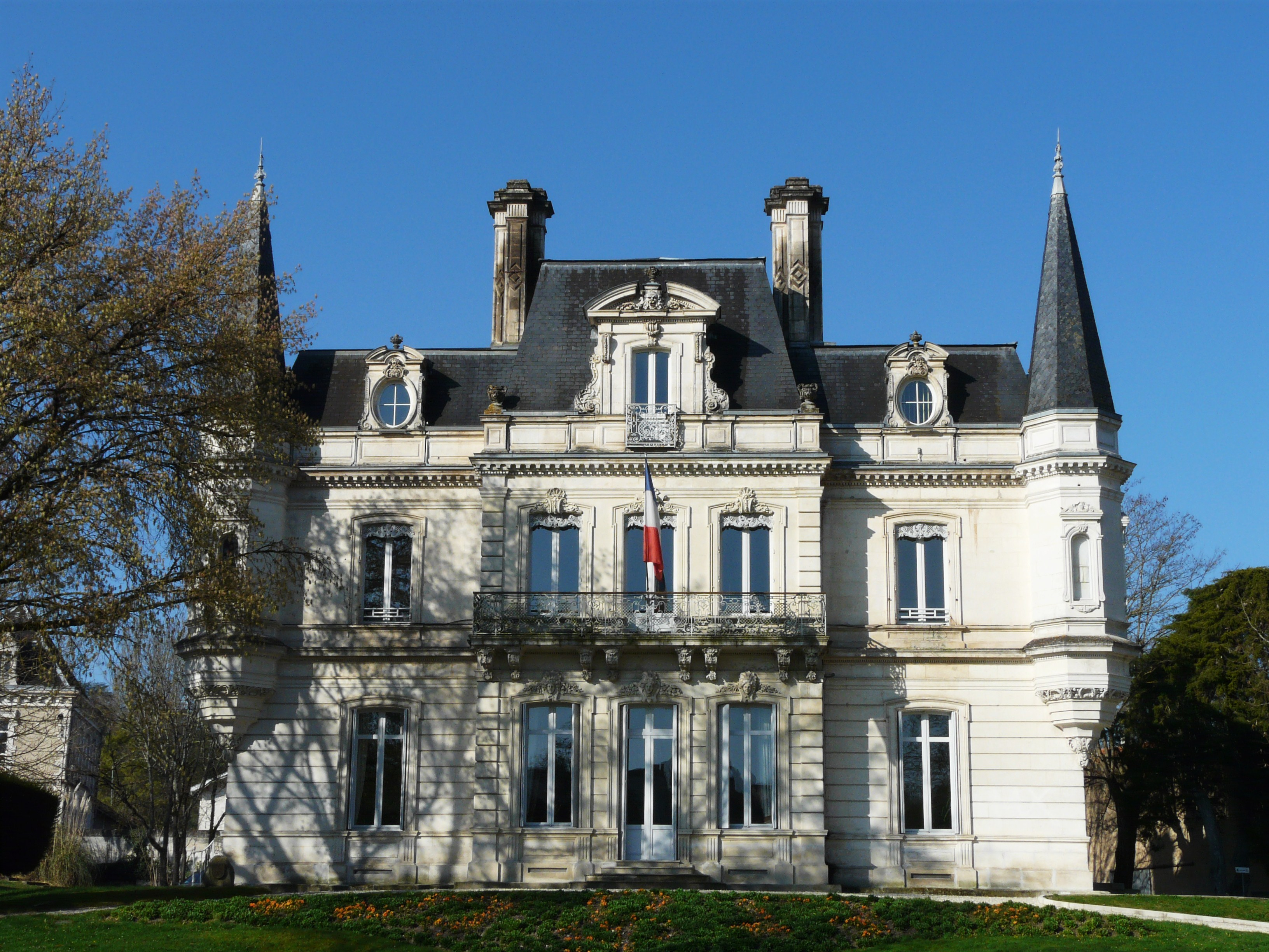 À l'est, la façade principale de la mairie de Ribérac, Dordogne, France.